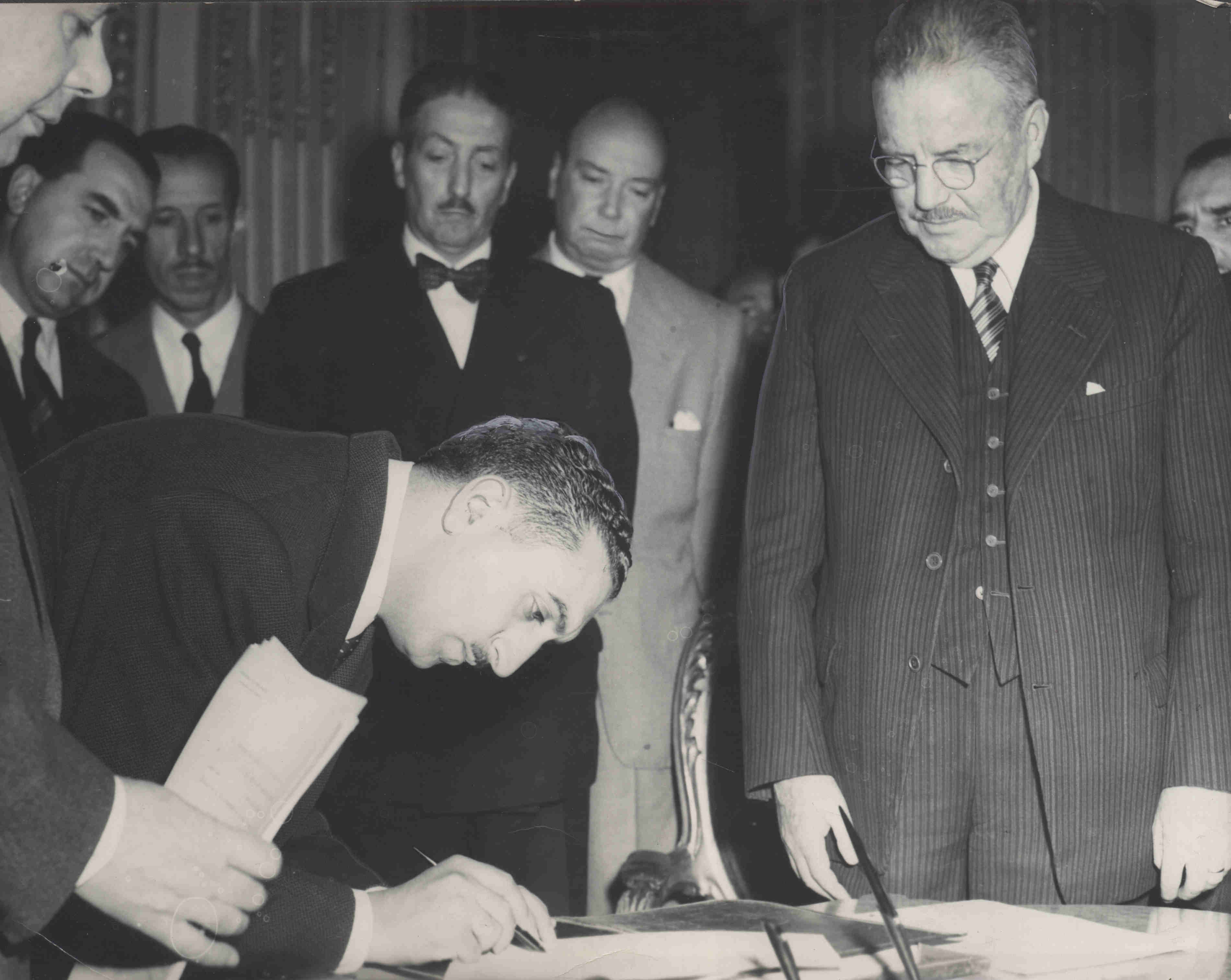 Alejandro Hales Jamarne como Ministro del Gobierno del presidente Carlos Ibáñez del Campo